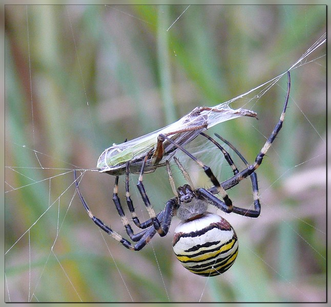 Paprastasis vapsvavoris (Argiope bruennichi). Fotografavo Darius Baužys. Rastas: Knistuškių k., Gardino apskr., Baltarusija. 2008 08 25